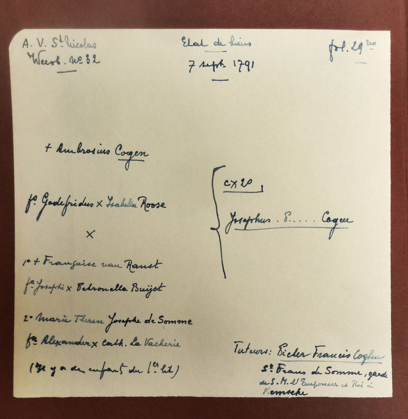 Handschrift Koller Staten van Goed